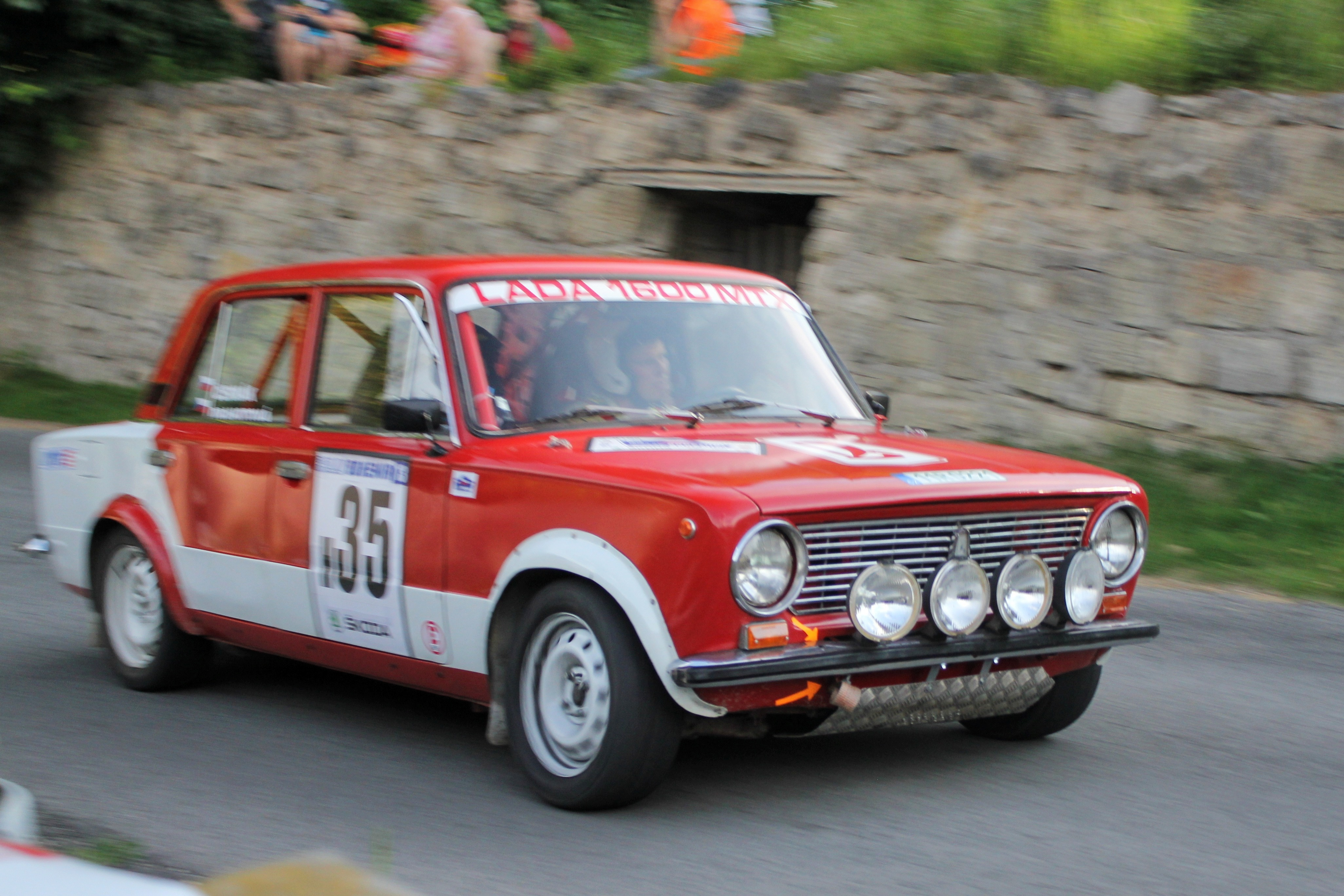 Lada 21011 / 1600MTX (gr. 2), Rally Bohemia Legend 2013